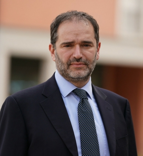 Andrea Rosati durante le elezioni regionali per la lista civica Prima Terni.